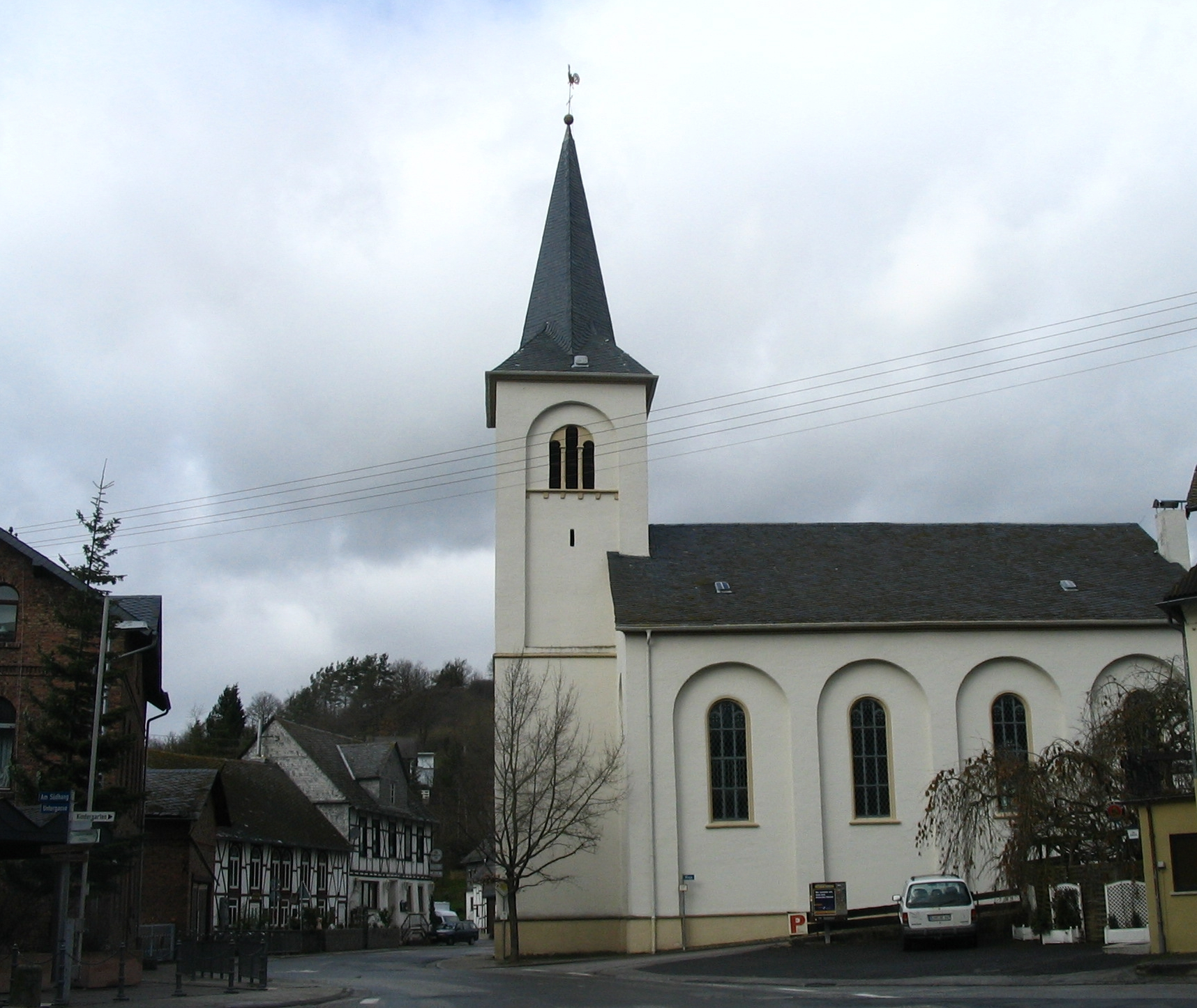 Mengerschied im Hunsrück, Ortsmitte und Kirche